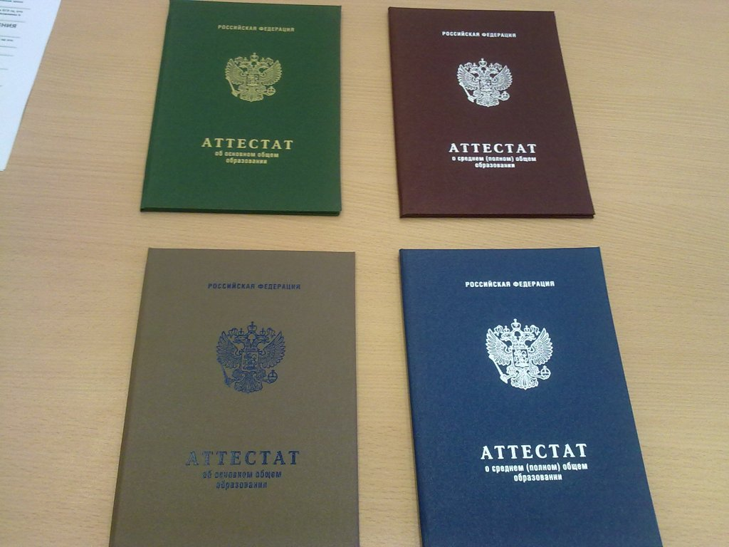 аттестаты россии